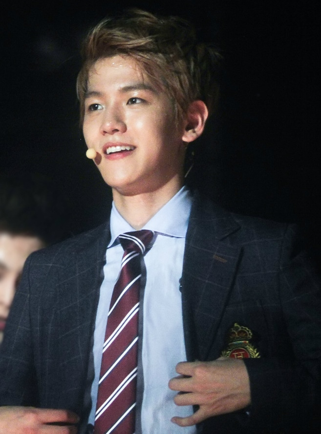 Baekhyun at the MTV World Stage in Malaysia on September 8, 2013.